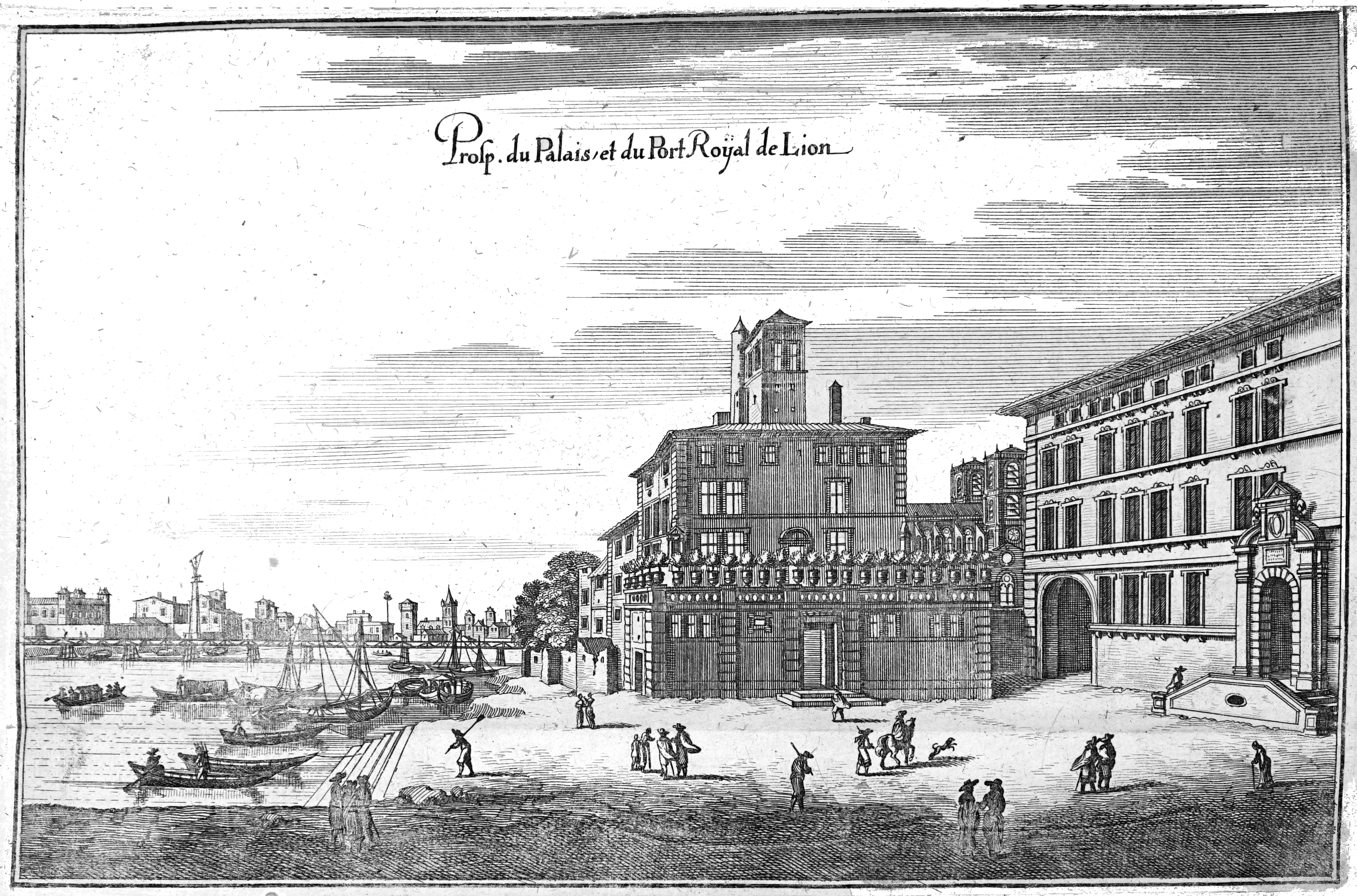 provenant de "Topographiae Galliae".